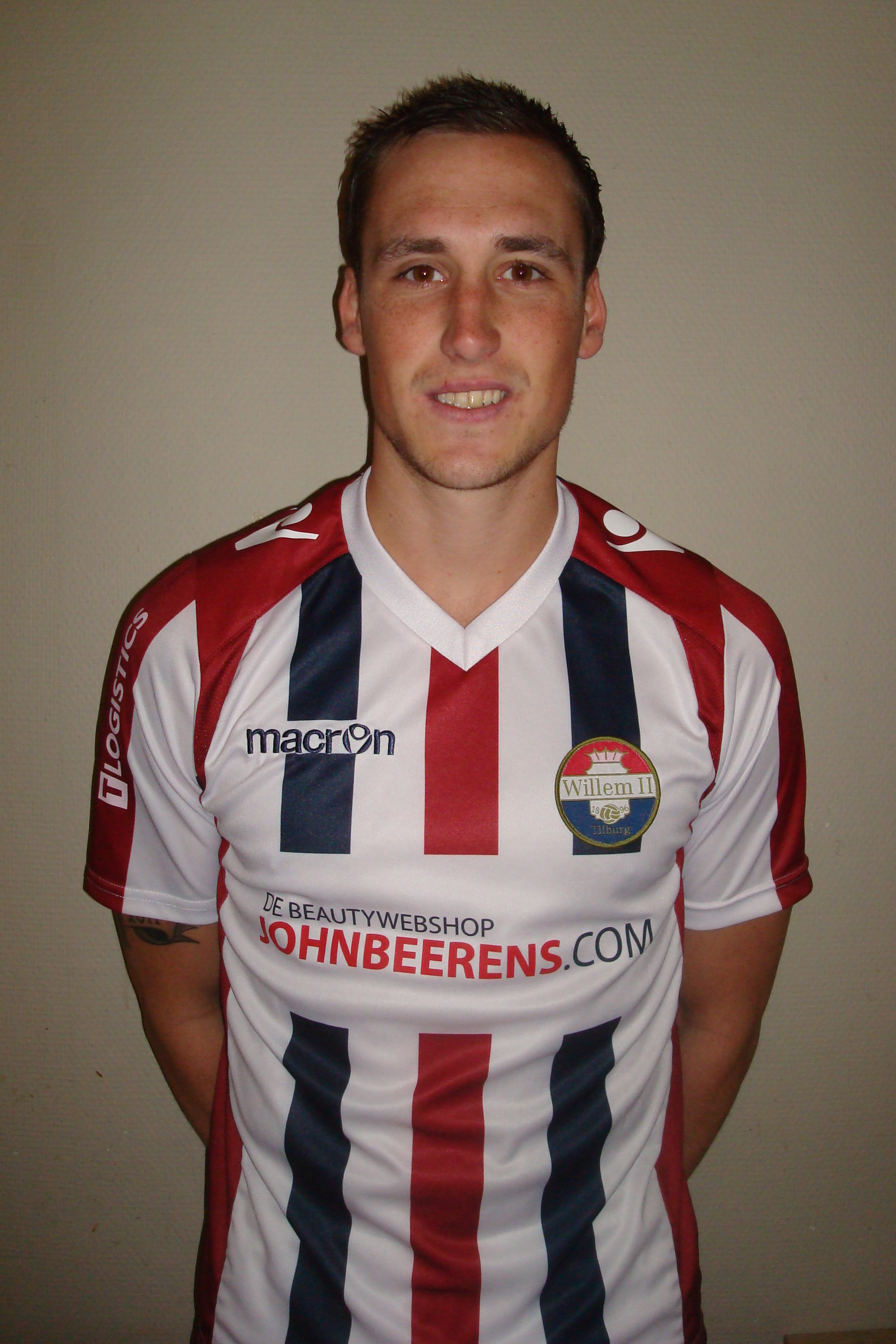 Ricardo Ippel in het shirt van Willem II seizoen 2013/2014